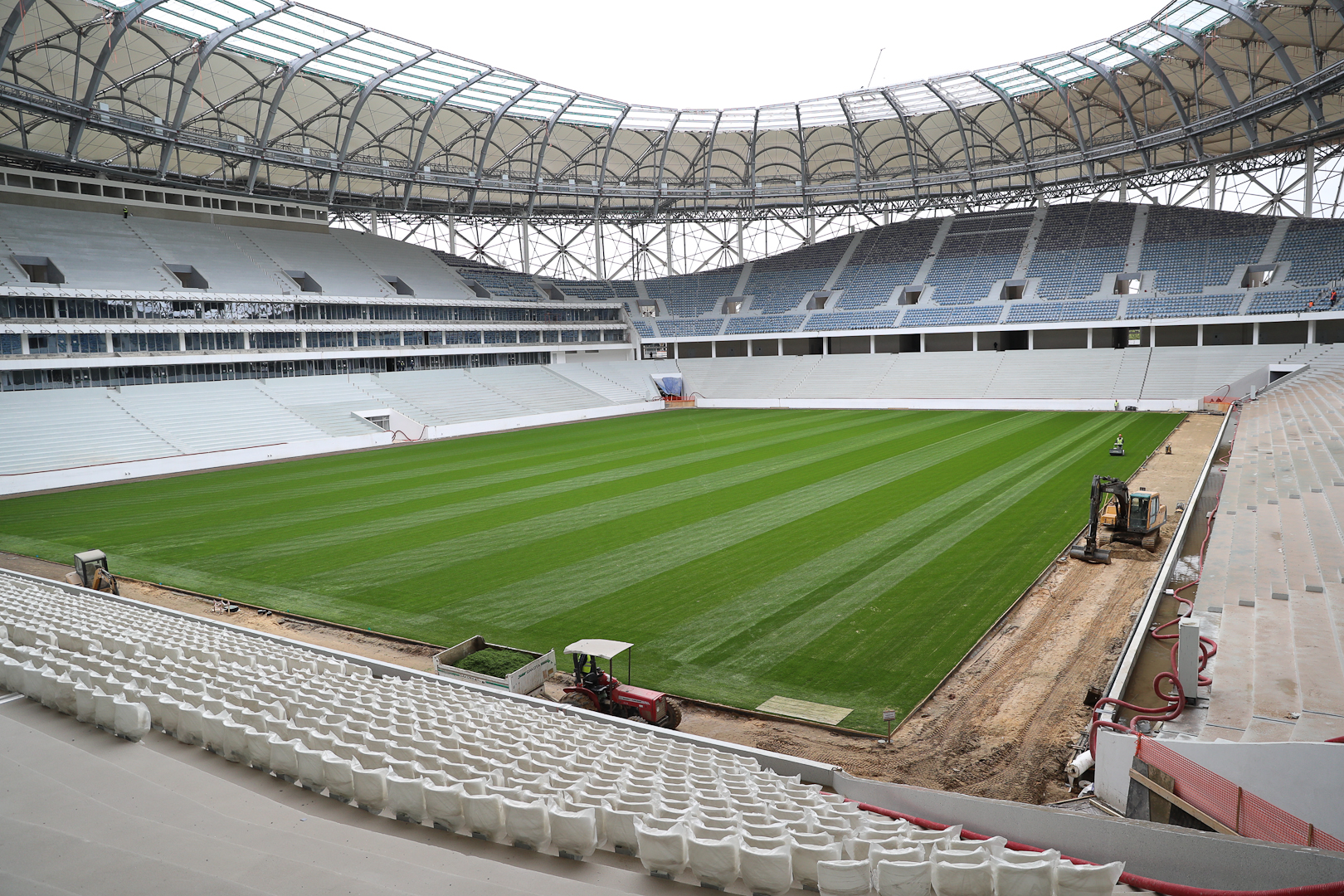 Строительство стадиона "Волгоград-Арена". 16 октября 2017 года.